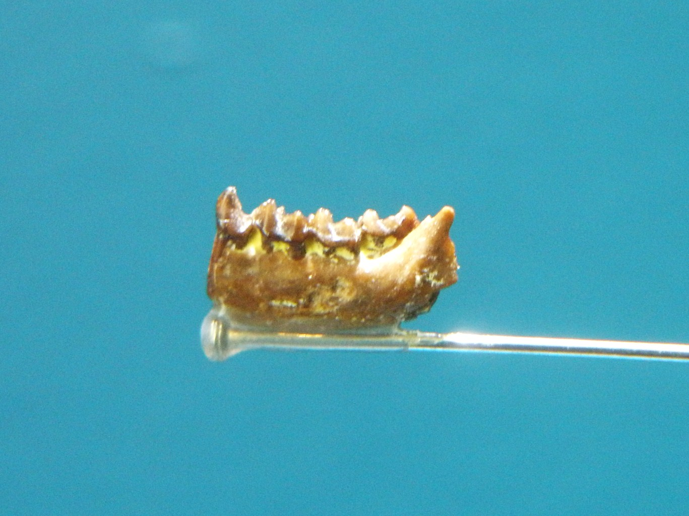 Fossil of Teilhardina, an extinct primate Took the photo at Musee d'Histoire Naturelle, Brussels